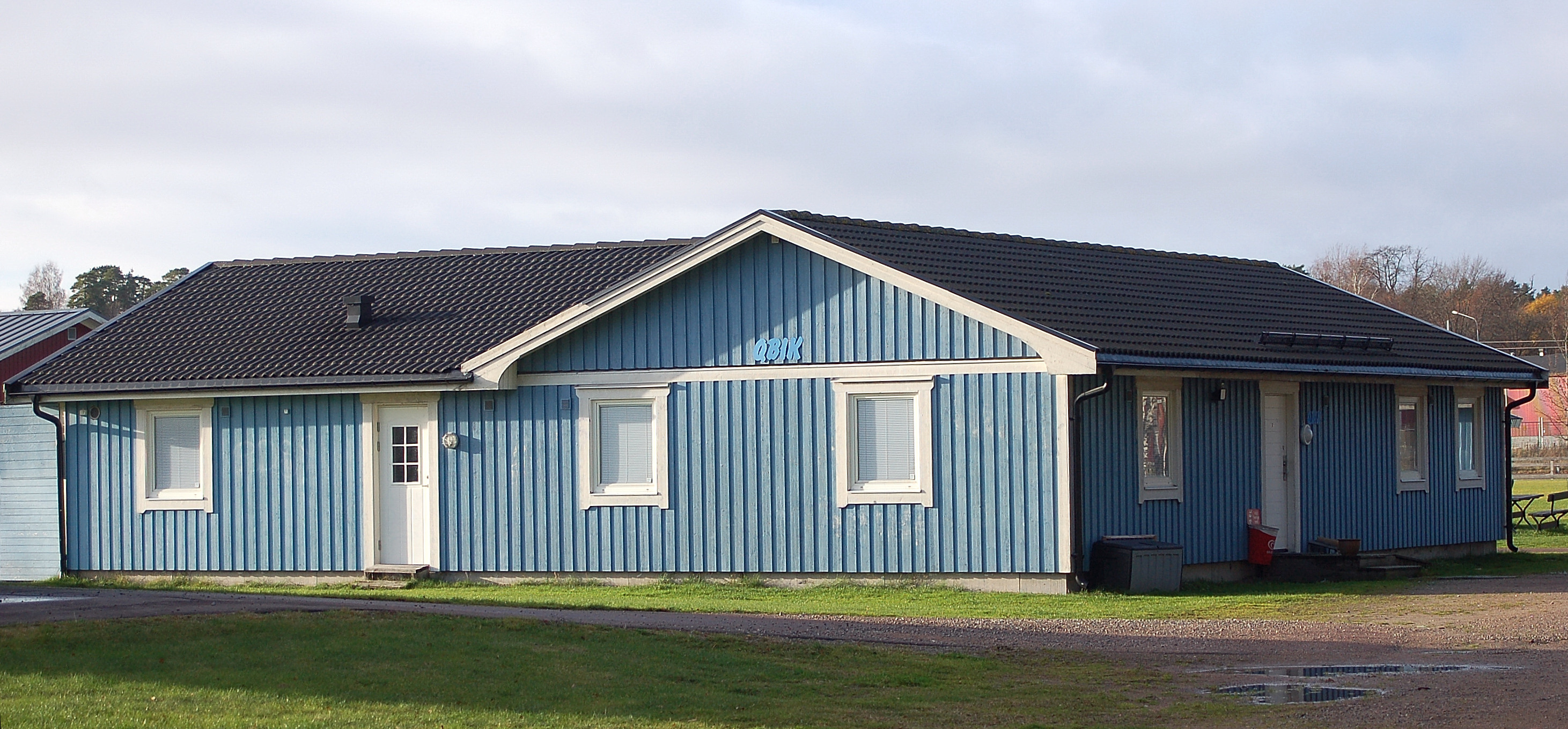 QBIKs klubbstuga Romstad, Karlstad.